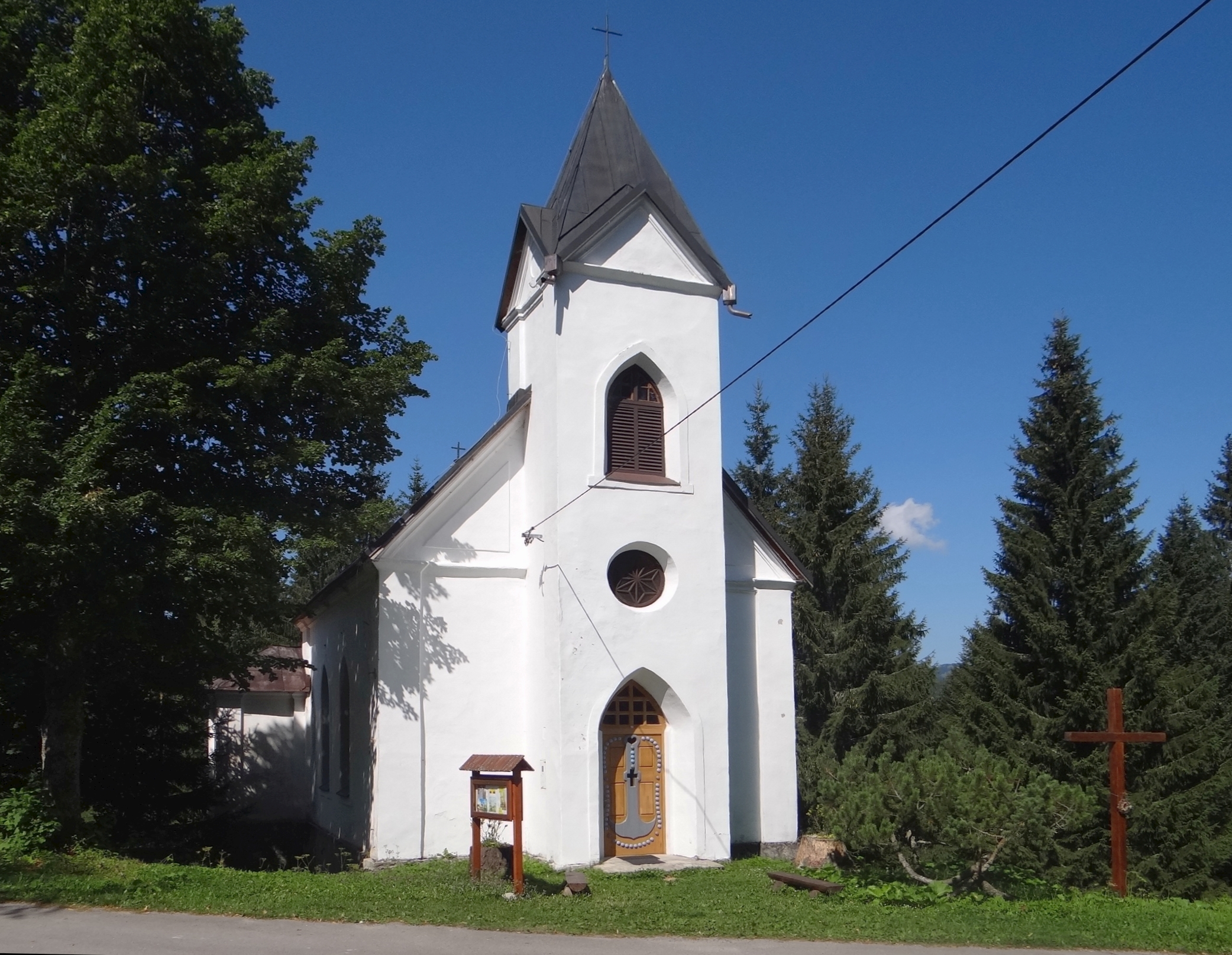 Kościół rzymskokatolicki w osadzie Magurka